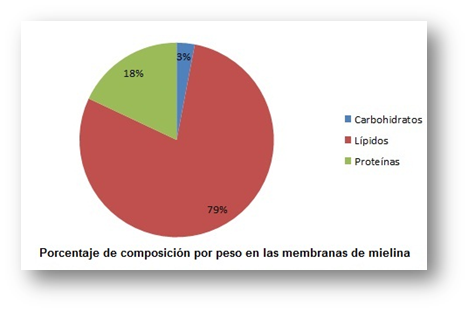 Esta gráfica muestra el porcentaje de composición por peso en las membranas con mielina.